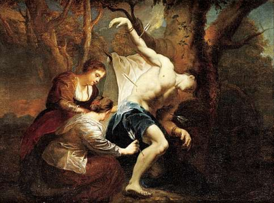 Genueser Schule: Die Heilige Irene pflegt den Heiligen Sebastian, 17. Jahrhundert. Öl auf Lwd., 58,5 x 78 cm